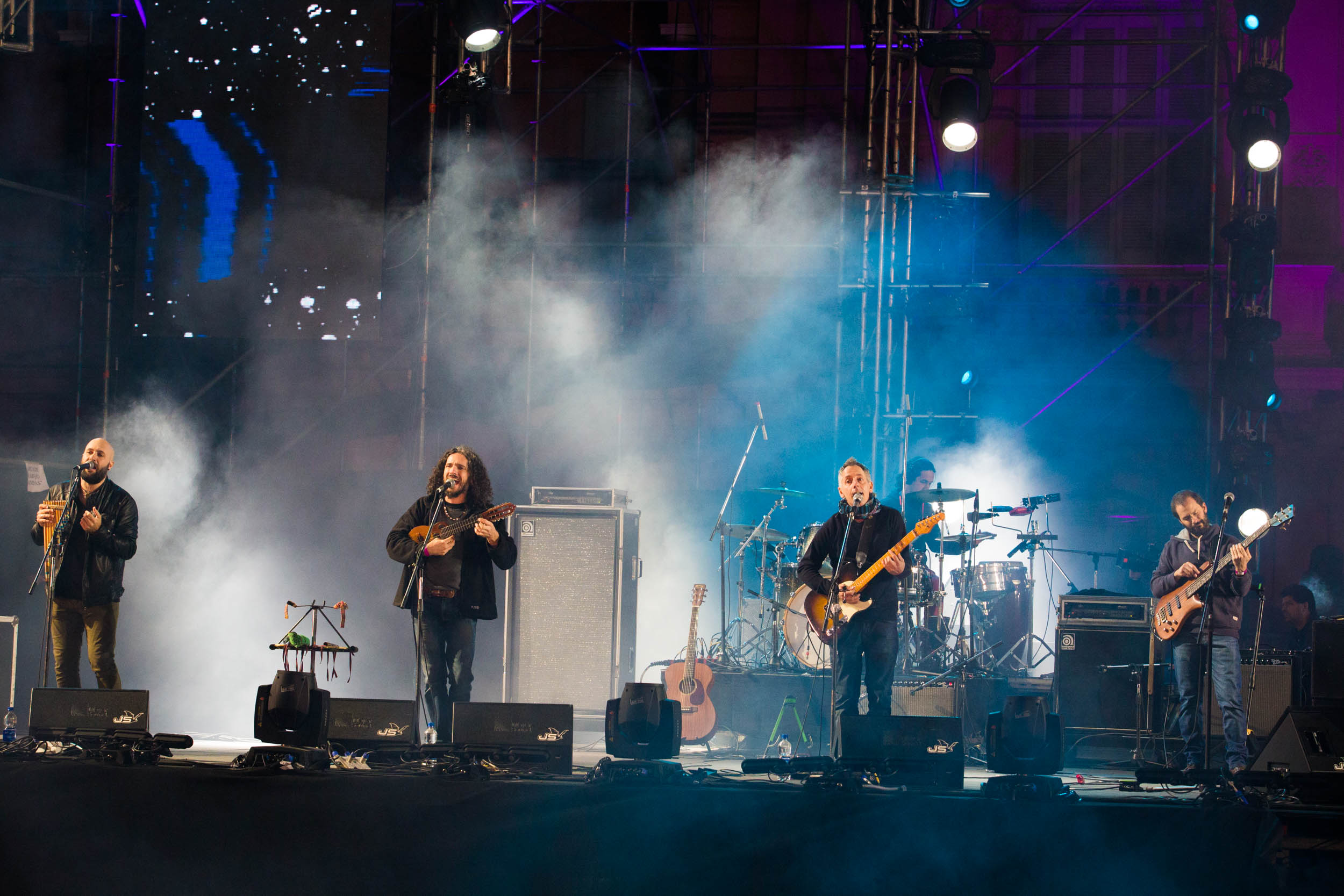 Buenos Aires, 24 de Mayo de 2015 - El Ministerio de Cultura de la Nación participa de los festejos por el nuevo aniversario de la Revolución de Mayo, que, bajo el lema “El mismo Sol, la misma Patria”, incluye cuatro días de propuestas artísticas en las calles, con la presentación de más de 70 solistas y grupos.